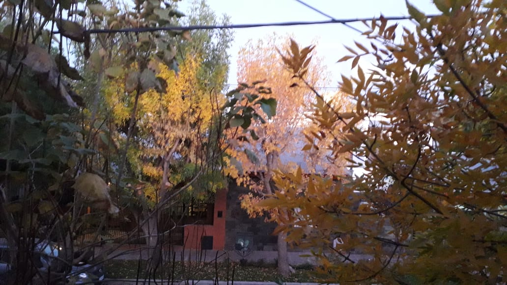 Un barrio de Neuquén (Capital) en pleno otoño